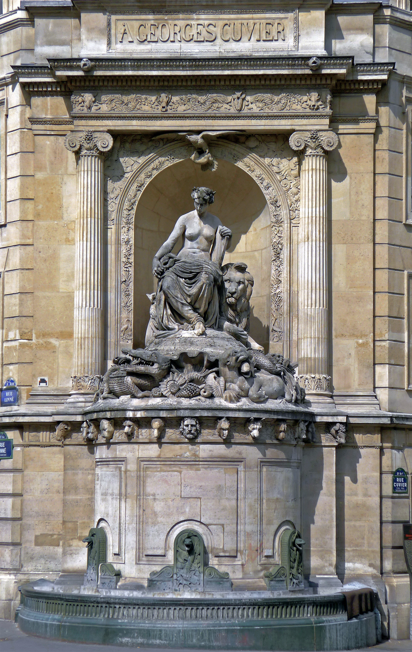 Fontaine Cuvier (Inscrit) - Rue Linné - Paris V .